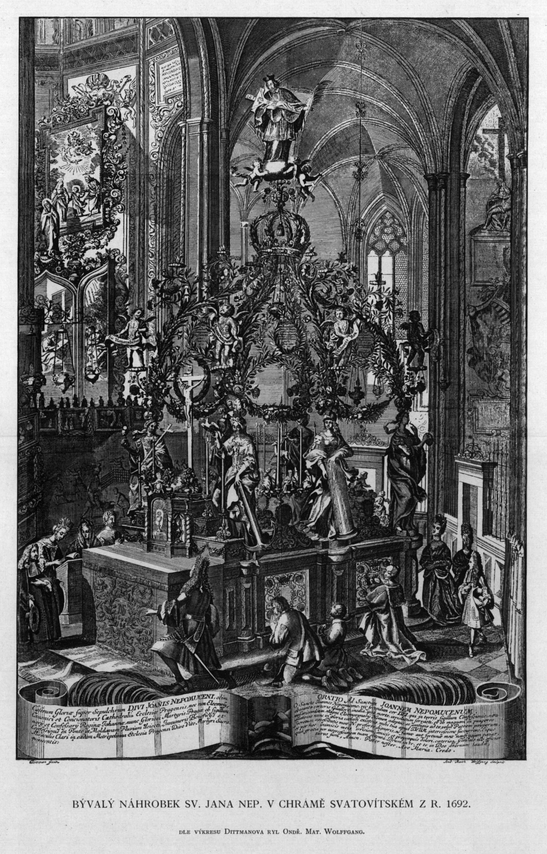 Rytina bývalého náhrobku sv. Jana Nepomuckého v chrámu sv. Víta v Praze z 1692. Podle kresby Kristiana Dittmanna.